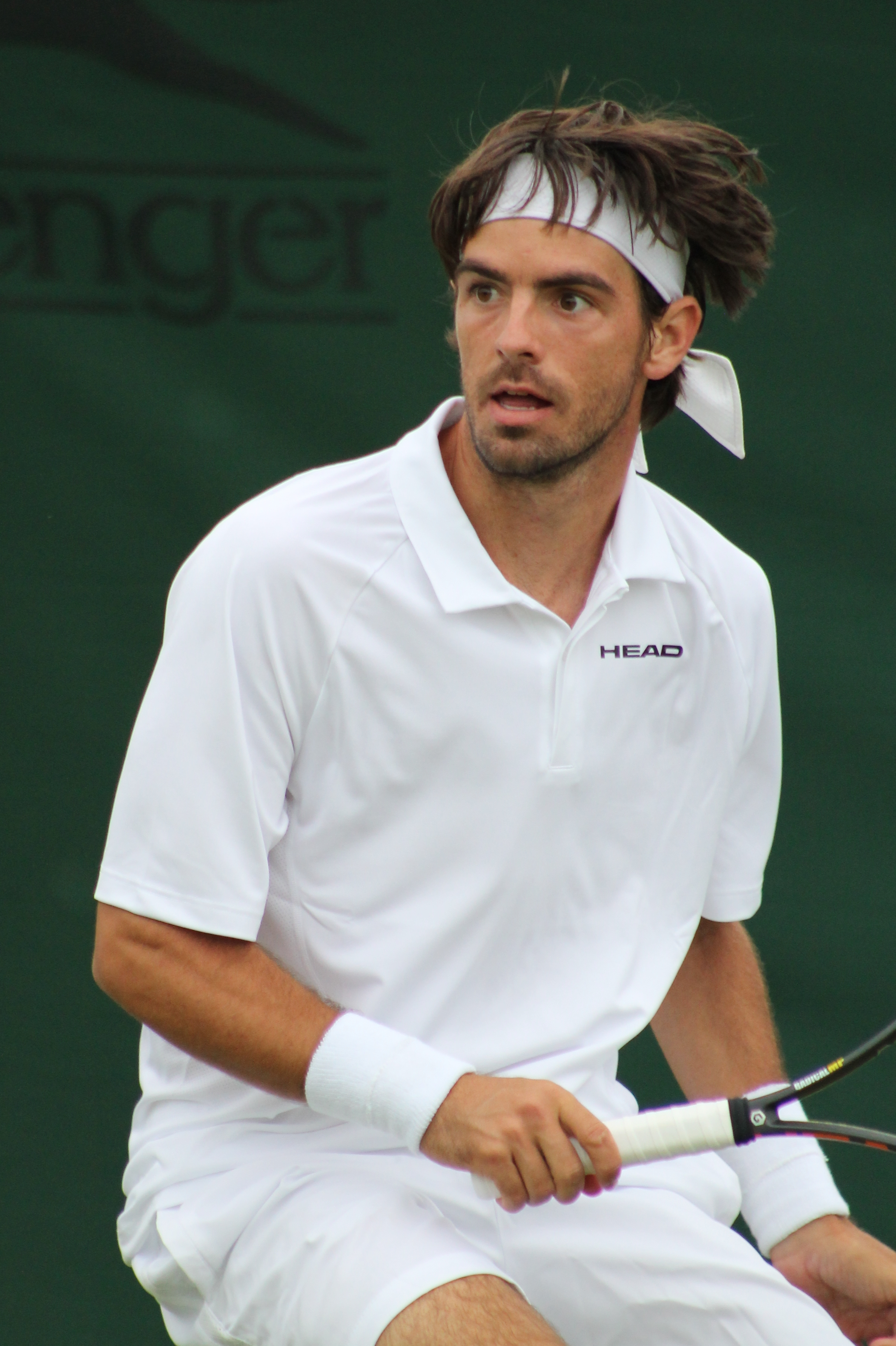 Elias WMQ14 (9)